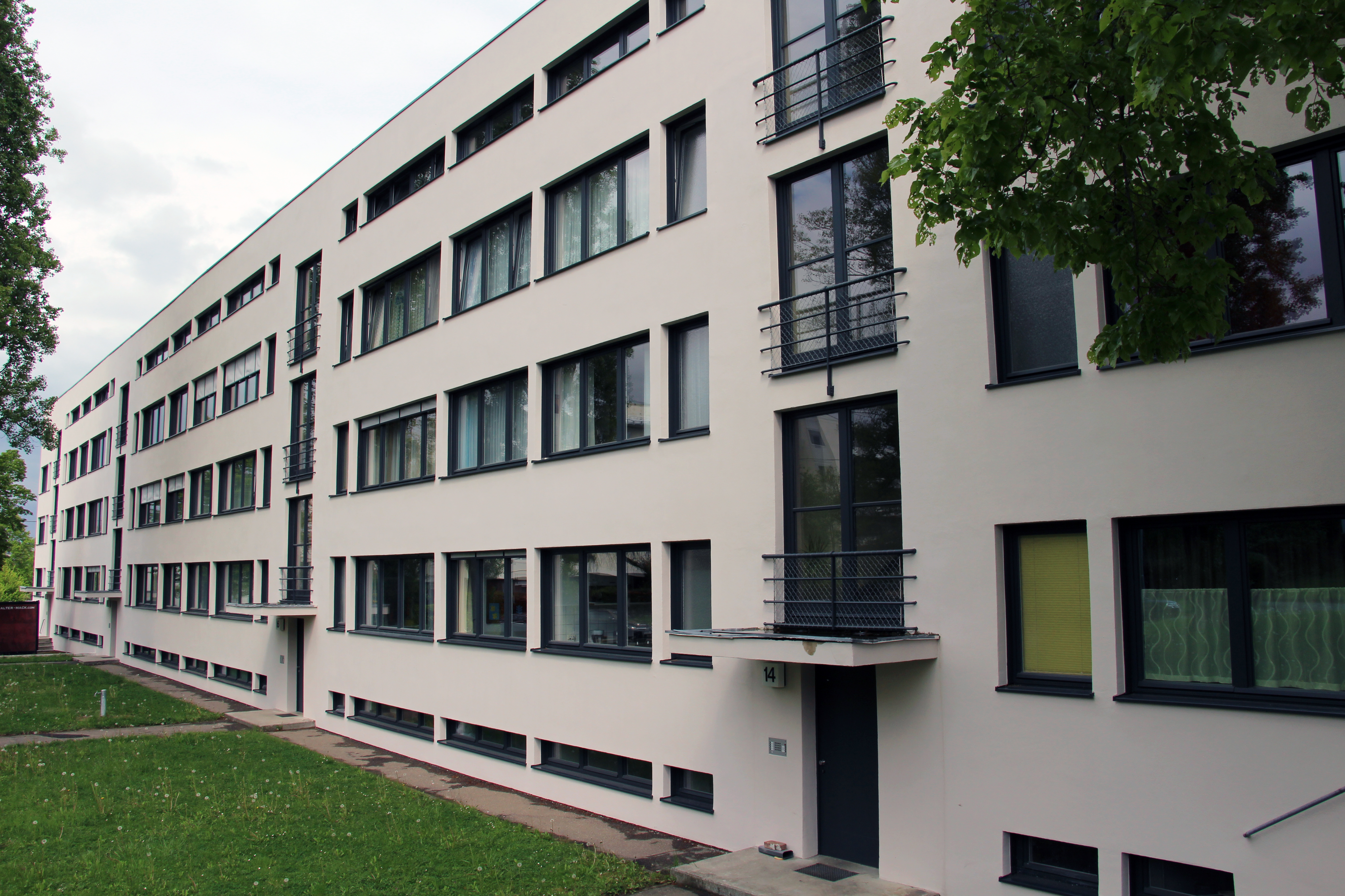 Am Weißenhof Functionalism. Arch. Ludwig Mies van der Rohe 1927